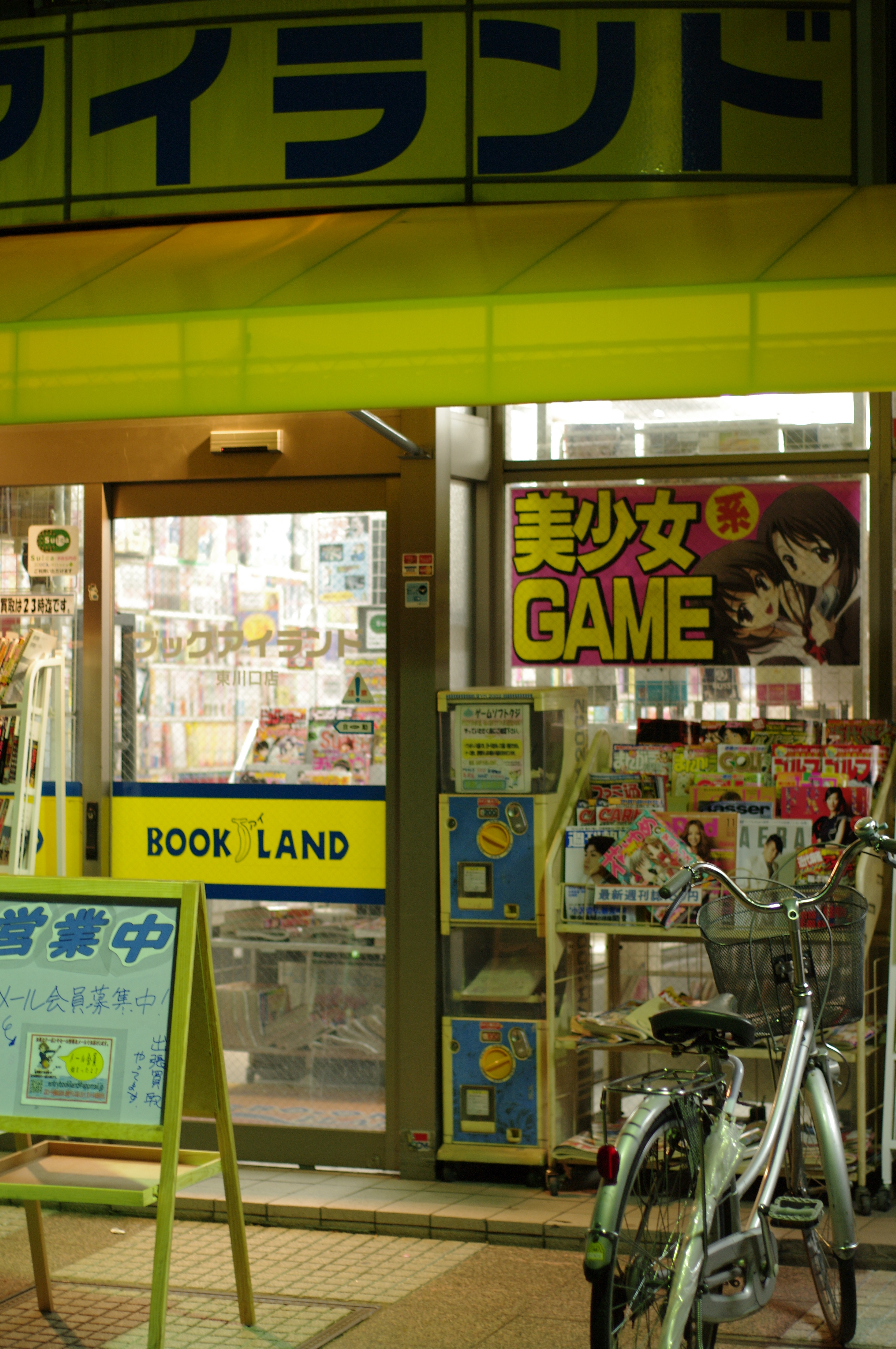 秋葉原一景。